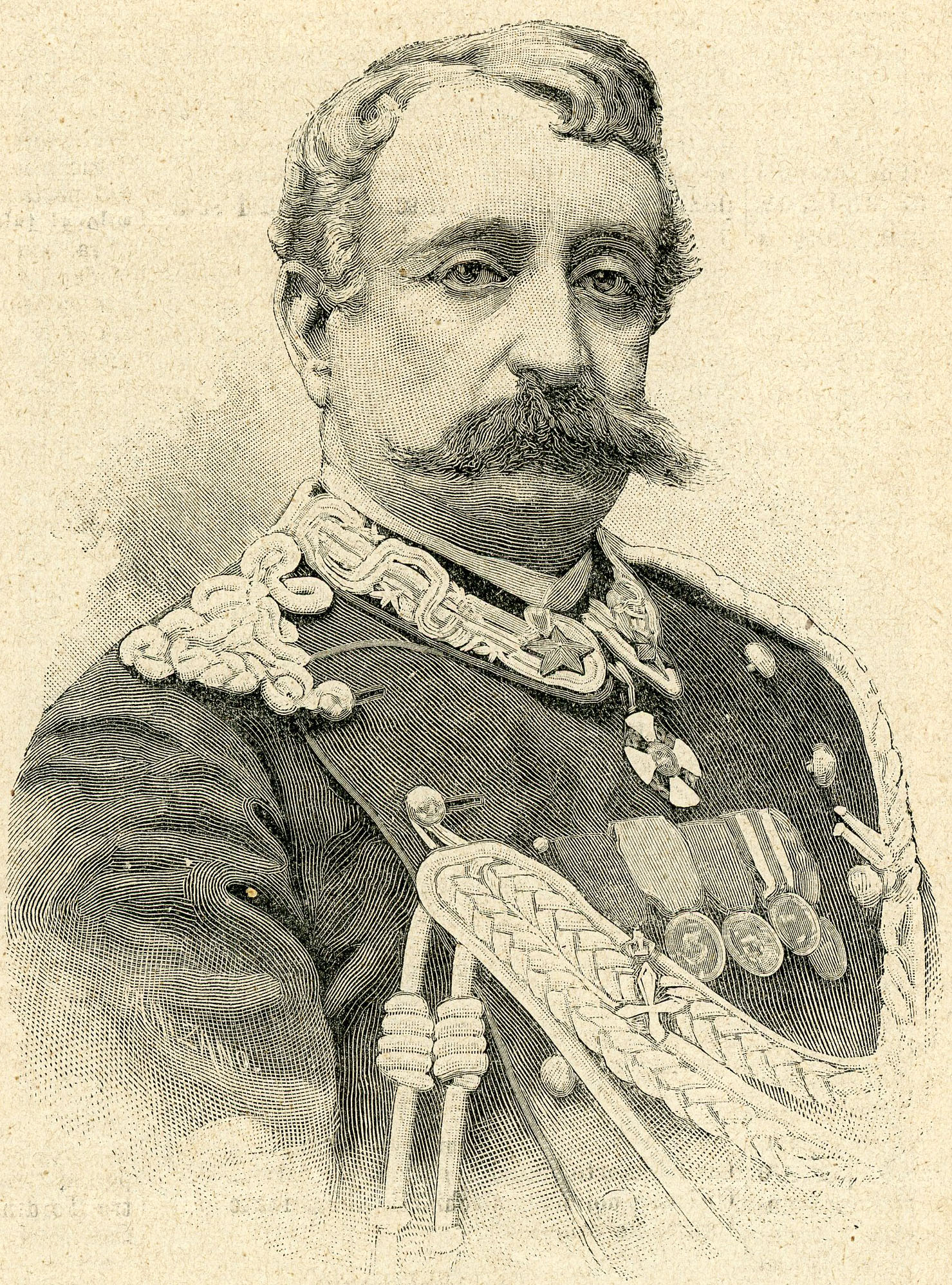 Il generale Annibale Ferrero, nuovo ambasciatore d’Italia a Londra (xilografia).